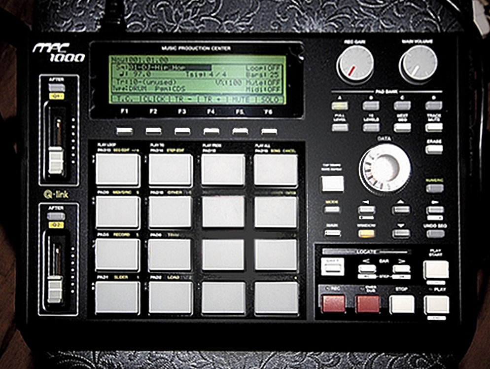 Akai MPC1000 black